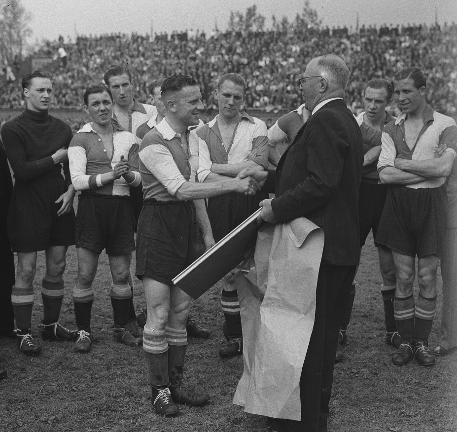 Ajax tegen Feijenoord. Huldiging Bas Paauwe.